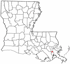 Volapük: Topam in tat: Louisiana.